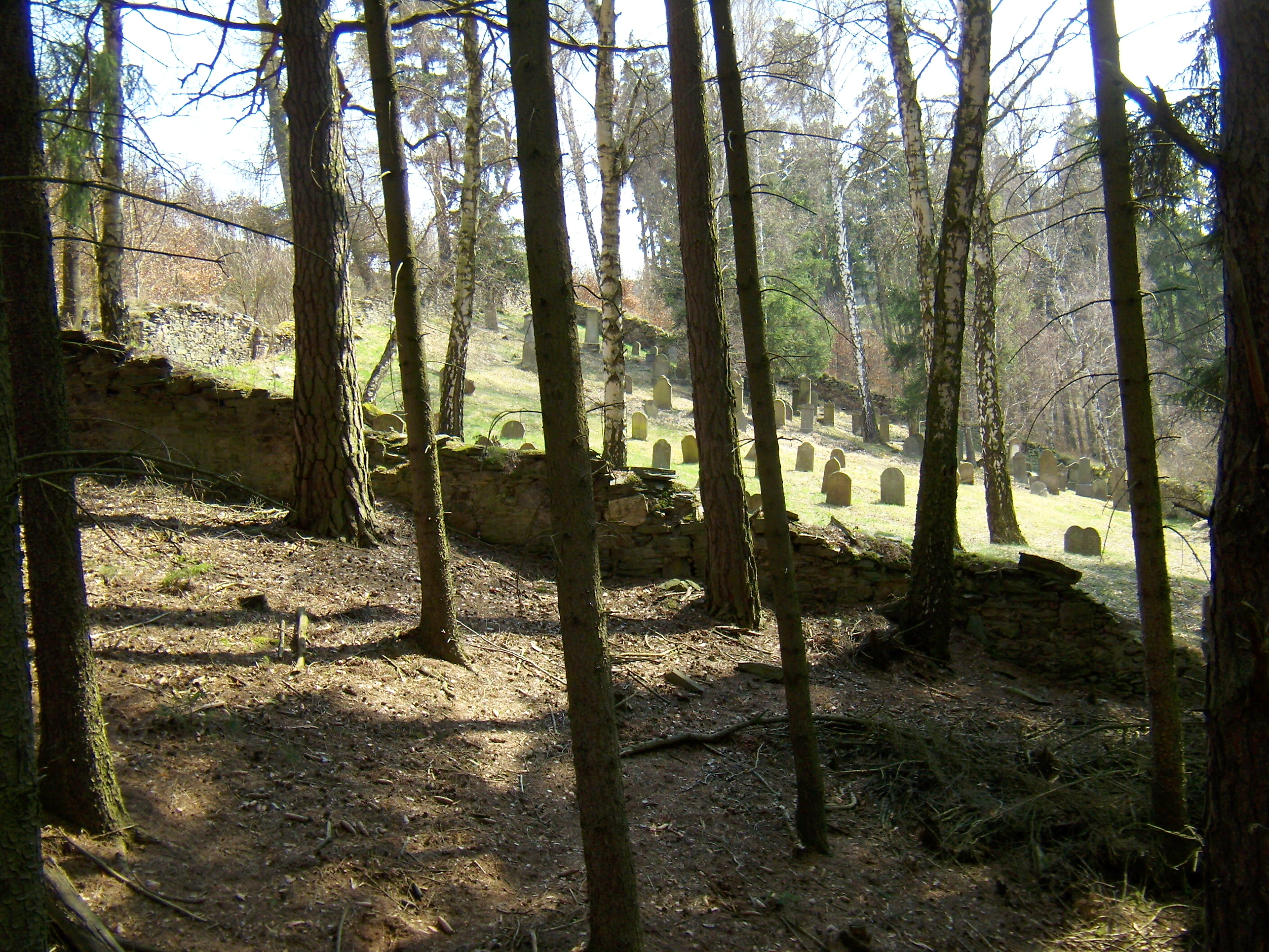 Ošelín ŽH 01